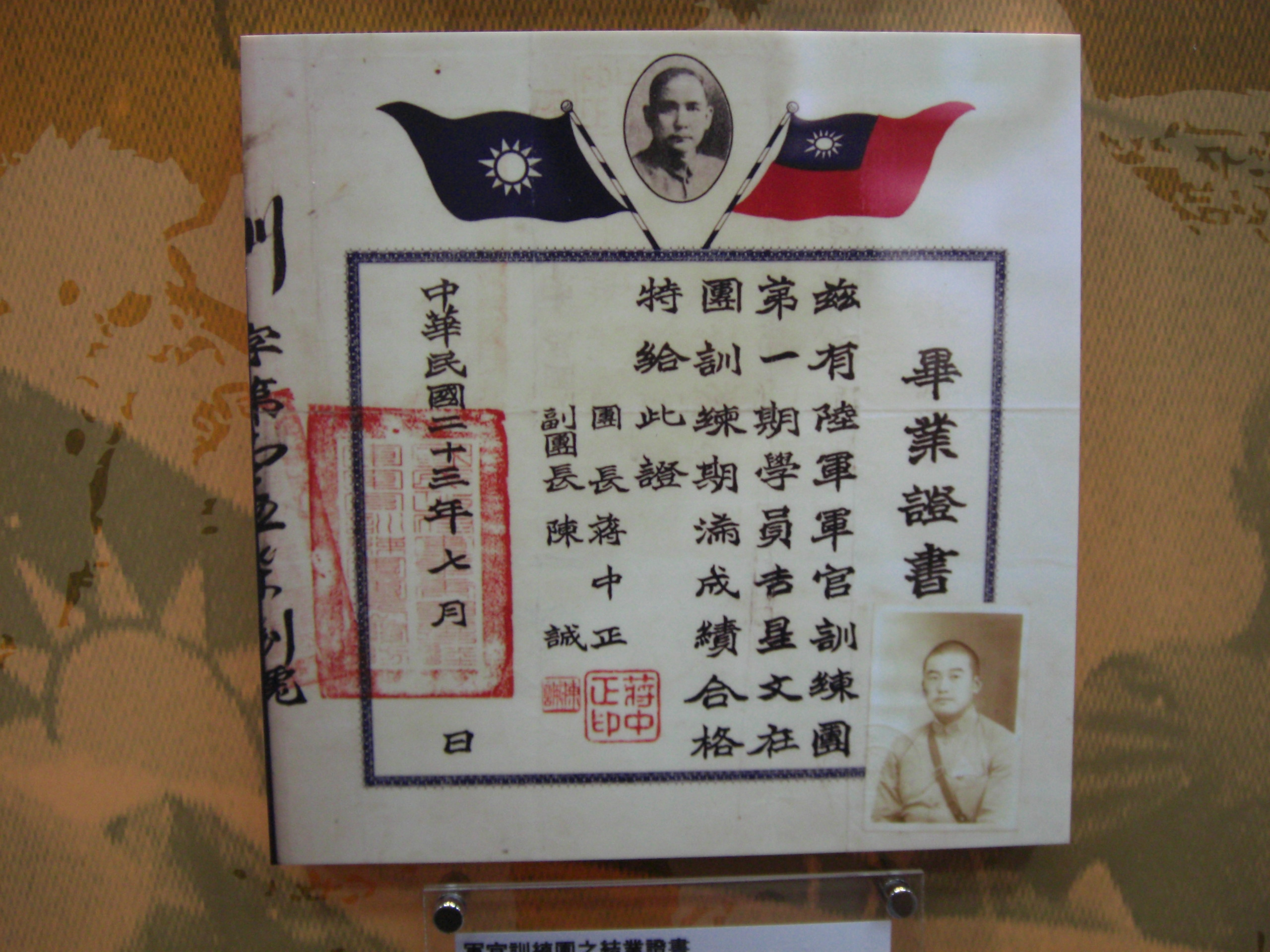 陸軍軍官訓練團第一期學員吉星文畢業證書